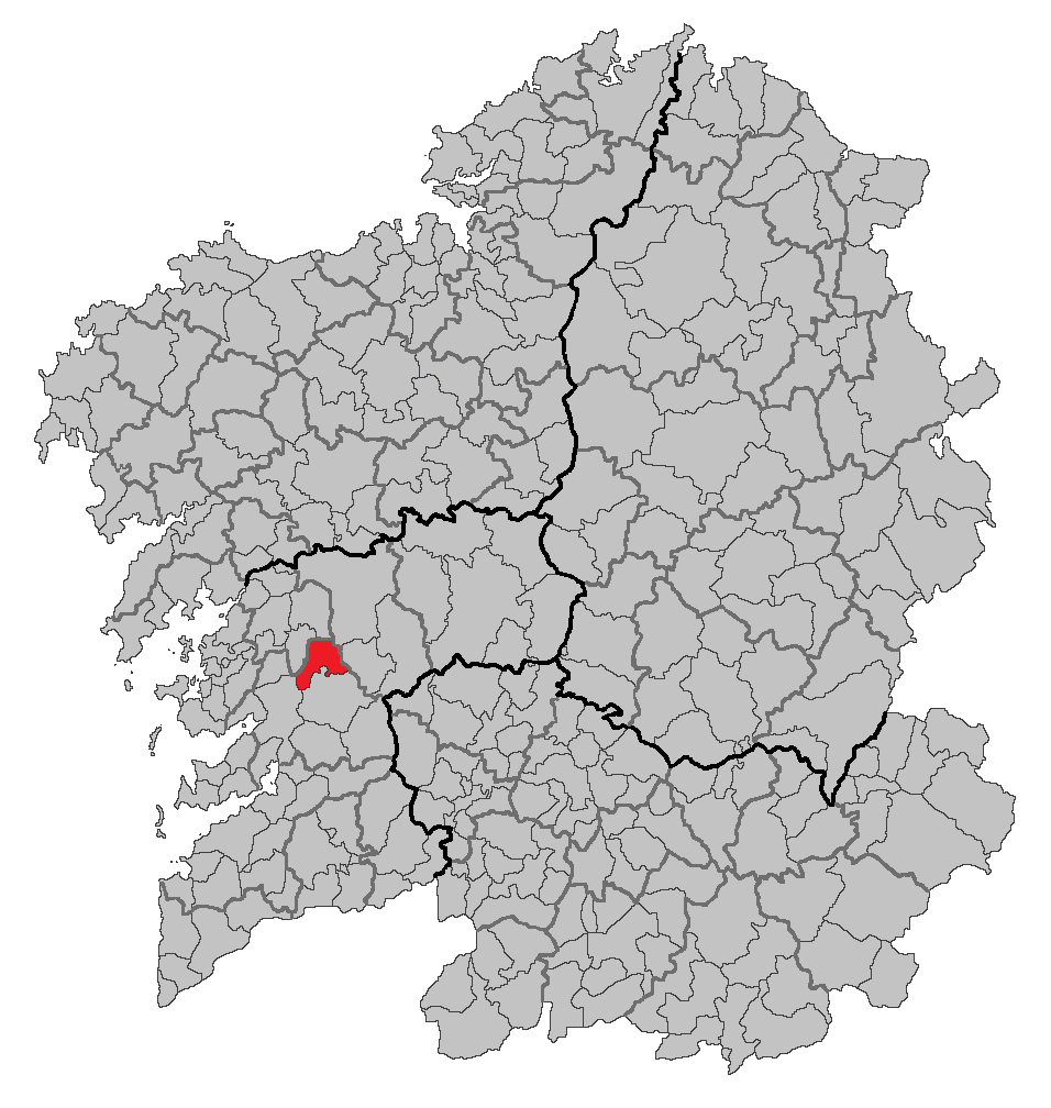 Mapa coa localización do concello de Campo Lameiro.